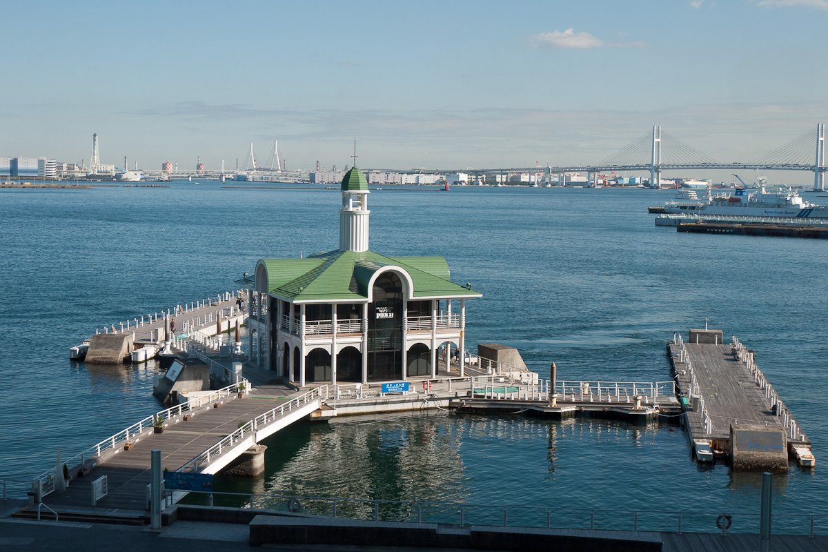 パシフィコ横浜脇の「ぷかり桟橋」。